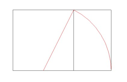 dessin d'un tracé d'un rectangle au nombre d'or avec un compas